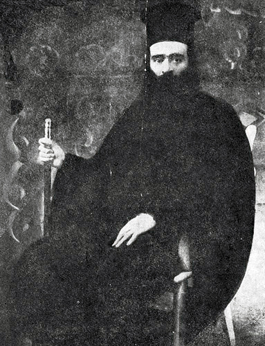 Ο Παπα-Ευθύμ Καραχισαρίδης. Φωτογραφία του 1919. Ο Παπα-Ευθύμ (κατά κόσμον Παύλος Καραχισαρίδης) πρωτοστάτησε στην προσπάθεια δημιουργίας αυτοκέφαλης τουρκορθόδοξης Εκκλησίας, σε σύγκρουση με το Οικουμενικό Πατριαρχείο – το οποίο μετά το 1919 είχε ταχθεί πλέον καθαρά στο πλευρό του ελληνικού μεγαλοϊδεατισμού. Συνεργάστηκε στενά με τους κεμαλικούς και κατάφερε να σώσει αρκετά μέλη της κοινότητάς του από διωγμούς κατά τη διάρκεια του ελληνοτουρκικού πολέμου. Αυτό φαίνεται ότι τον βοήθησε να πετύχει κάποια λαϊκή στήριξη για το εγχείρημά του, το οποίο πάντως με το τέλος του πολέμου δεν είχε πολλή τύχη.